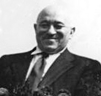 Factual corrections and alternative descriptions are encouraged separately from the original description. Additionally errors can be reported at this page to inform the Bundesarchiv. Original historic description: Budapest, II. Weltfestspiele, Festumzug, Ehrentribüne Weltjugendspiele in Budapest beendet-Am 28.August 1949 verabschiedeten sich die ausländischen Delegierten der Weltjugendspiele von Budapest und seiner gastfreundlichen Bevölkerung.Eine große Schlußdemonstration, an der sich alle Delegierten beteiligten, bildeten den Abschluß der Festspiele.In endlos scheinenden Zügen zogen die Delegierten der einzelnen Nationen durch die Straßen der ungarischen Hauptstadt zum Heldenplatz, wo der stellv.Ministerpräsident Matyas Rakosi eine Ansprache hielt.Die Vertreter der Weltjugend gelobten dort, daß sie ihren Kampf für den Frieden bis zum Sieg fortsetzen werden UBzEhrentribüne am Heldenplatz:vlnr:Matyas Rakosi, stellvertr.Premierminister, Generalsekretär der ungarischen Arbeiterpartei und Vorstizender der Volksfront;N.Mihailov, Generalsekretär des Komsomol;J.Grohmann, Generalsekretär der Internationalen Studentenvereinigung;George Non, Präsident der Minsz(Volksunion der ungarischen Jugend) ;Guy de Boisson, Präsident des Weltjugendbundes.Foto:Illus